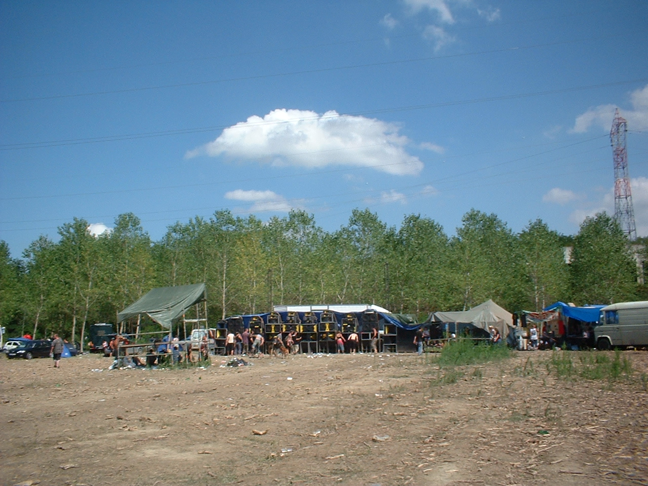 Mur de Son au teknival de Pavia (Italie) en 2005